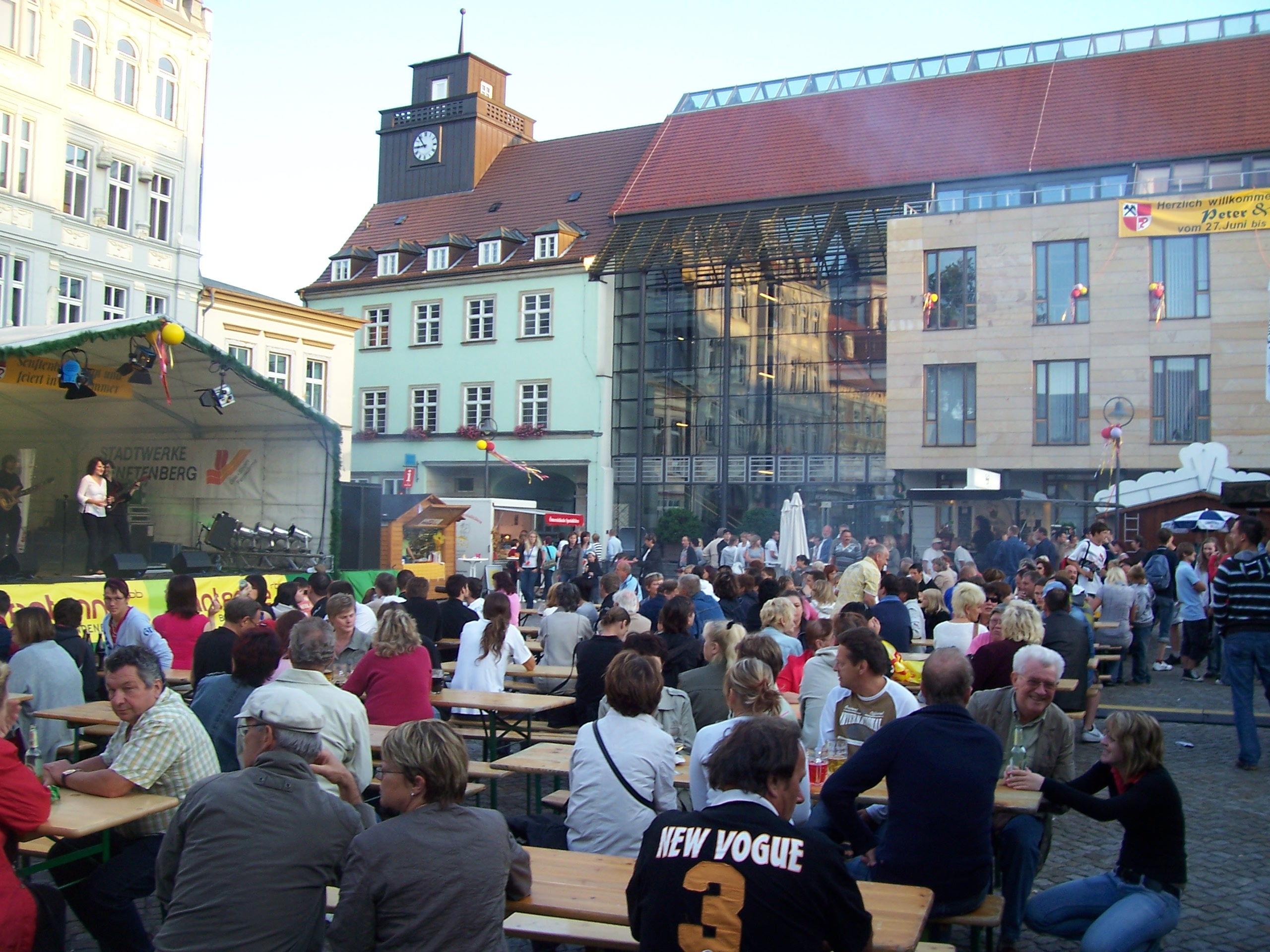 Beginn des 2008er Peter-und-Paul-Marktes in Senftenberg